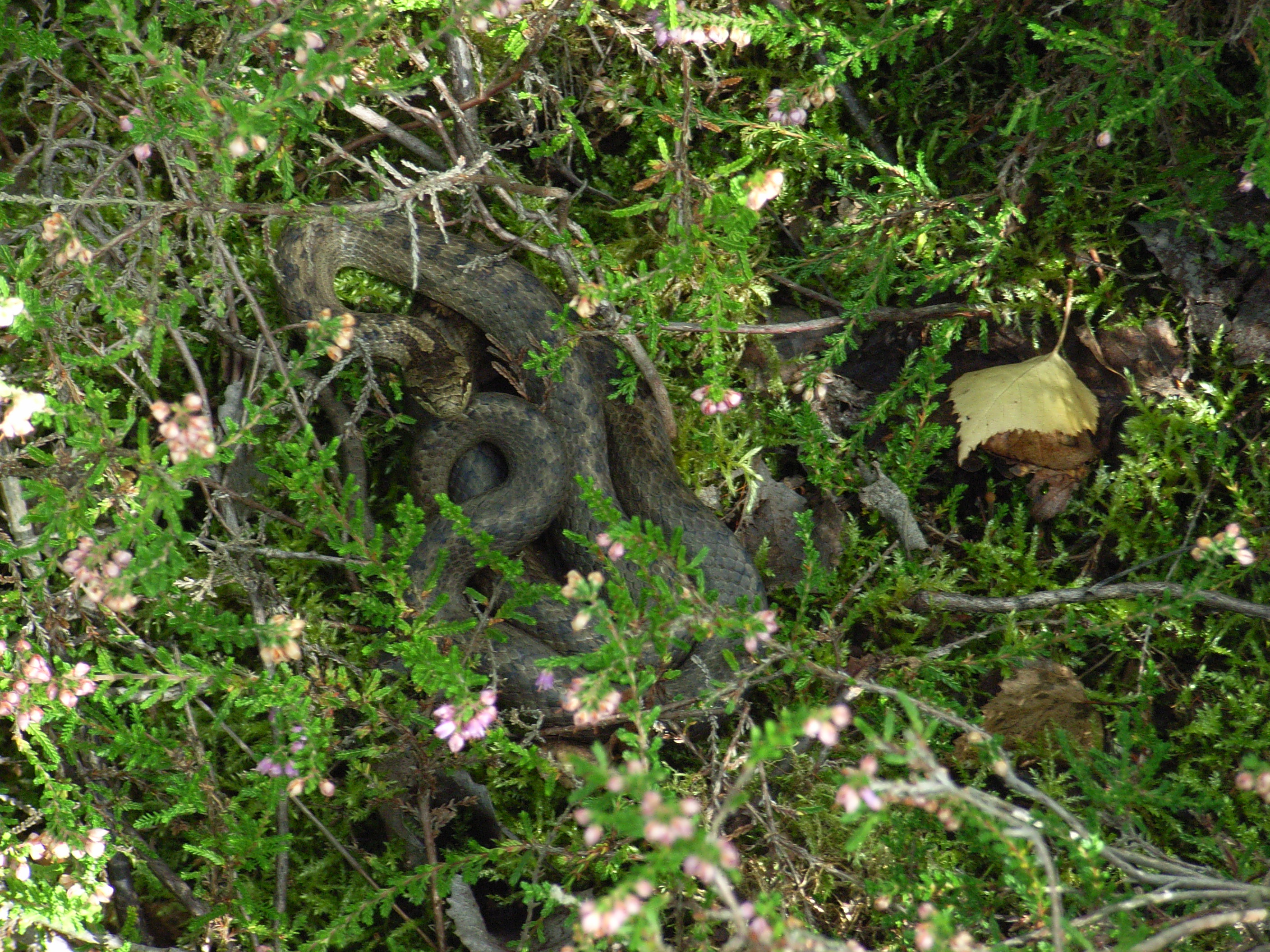 Ein Weibchen der Glatt- oder Schlingnatter (Coronella austriaca) im Heidekraut (Calluna vulgaris) an der oberen Kante eines Steinbruchs im Herbst 2007